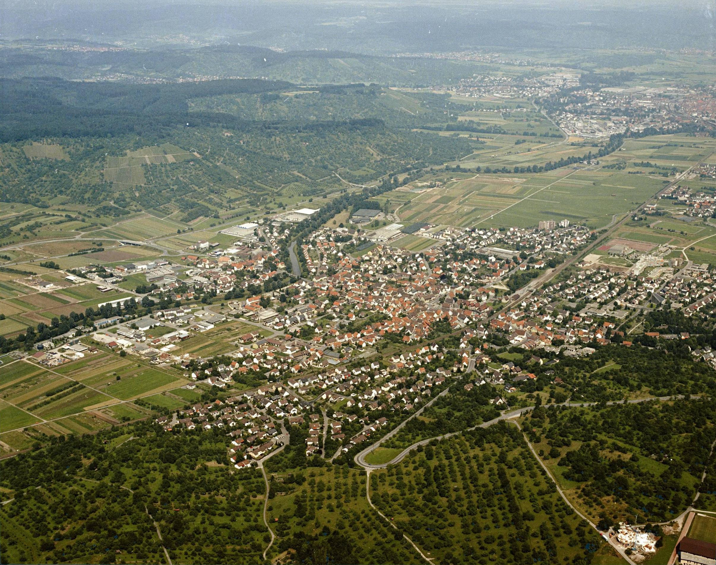 Luftbild von Winterbach - Staatsarchiv Sigmaringen - Archivalieneinheit N 1/96 T 1 Nr. 348